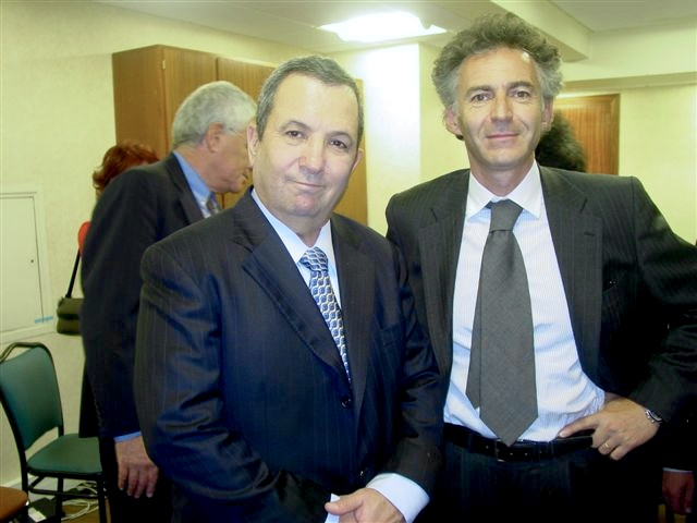 Photo de François Zimerais et Ehud Barak lors d'une mission en Israël.